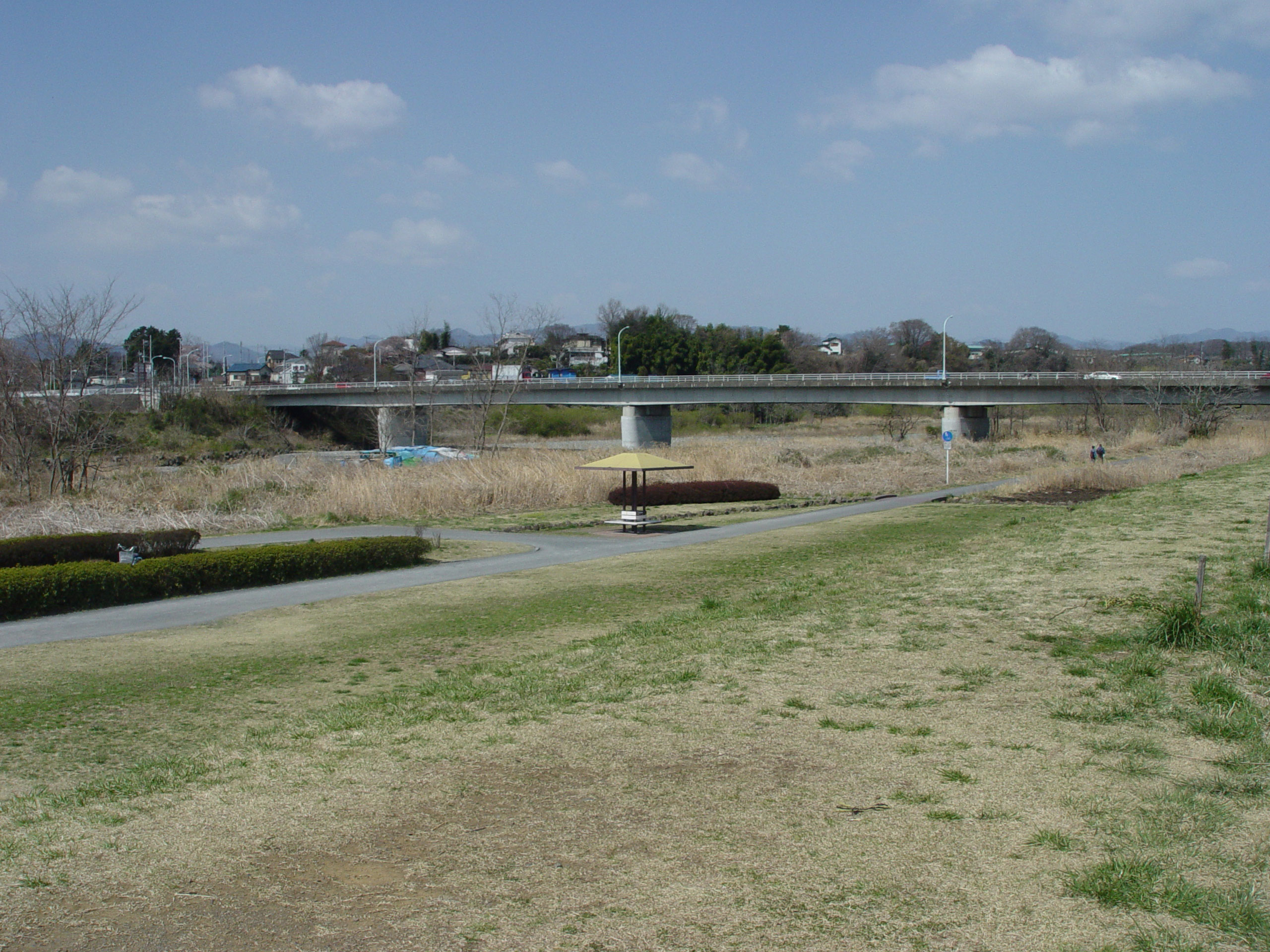 Tama Bridge, Itsukaichi Kaido, Tokyo prefectural road route 7 ja: 東京都道7号杉並あきる野線五日市街道多摩橋、多摩川。福生市、あきる野市